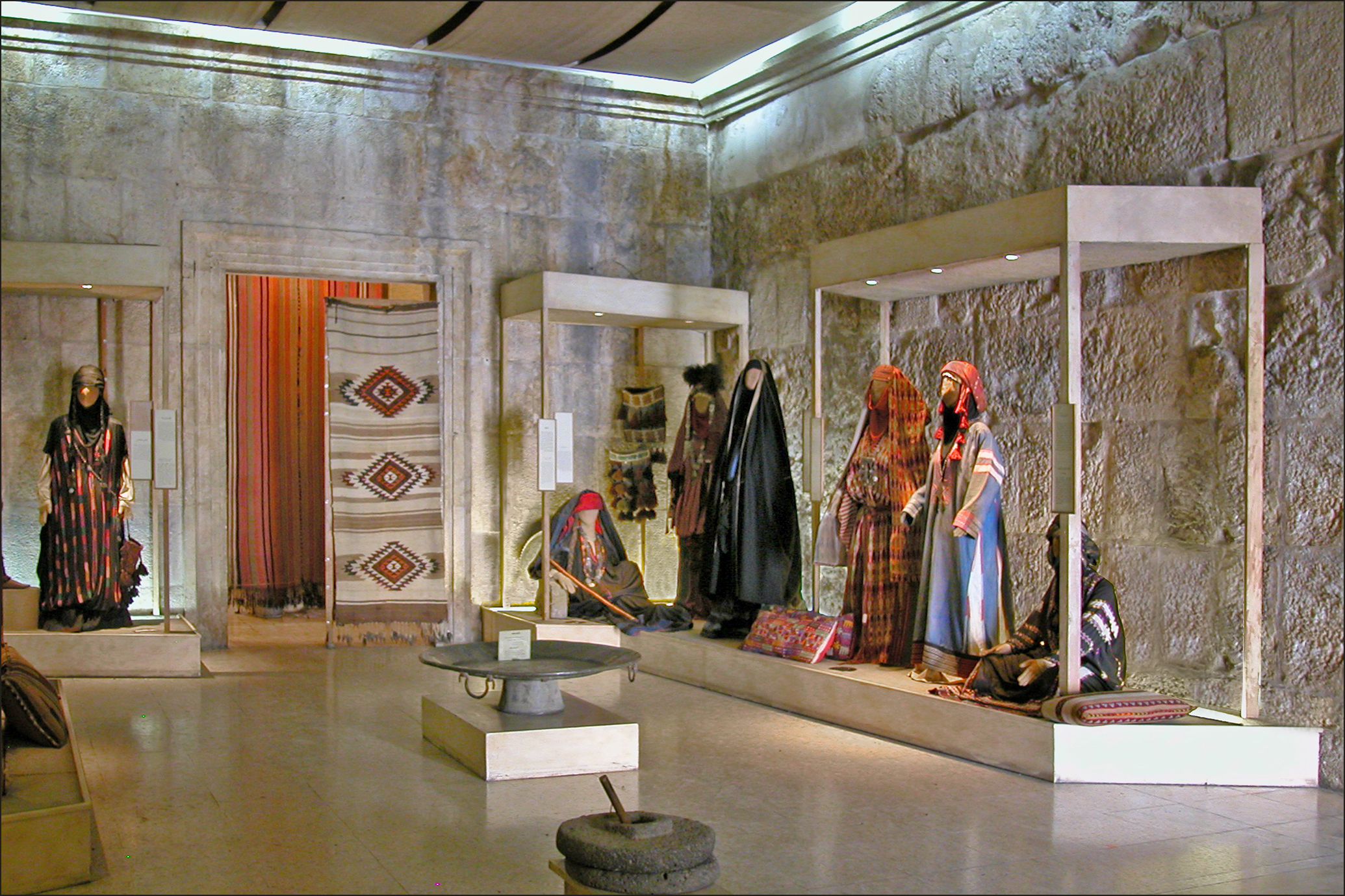 Salle du musée des traditions populaires Le Musée des arts et traditions populaires de Jordanie a été ouvert en 1971. Il est situé à l'est du théâtre romain à Amman et a pour ambition de rassembler le patrimoine jordanien et palestinien de toute la Jordanie afin de le protéger et de conserver pour les générations futures. Il est en outre chargé de faire connaître cet héritage populaire au monde entier. Le musée comprend cinq salles d'exposition. -La première est consacrée aux costumes traditionnels de la Transjordanie. -La seconde aux bijoux et produits de beauté traditionnels des diverses régions de la Transjordanie et de la Cisjordanie. -La troisième présente une collection de robes et de costumes palestiniens. -Dans la quatrième sont exposés une collection de poteries et de récipients en bois pour la cuisine ainsi que des bijoux en argent et des robes de mariées provenant de la Cisjordanie. -La cinquième, située dans une chambre forte du théâtre romain, abrite une collection de mosaïques des églises byzantines à Jérash et Madaba. extrait du site officiel